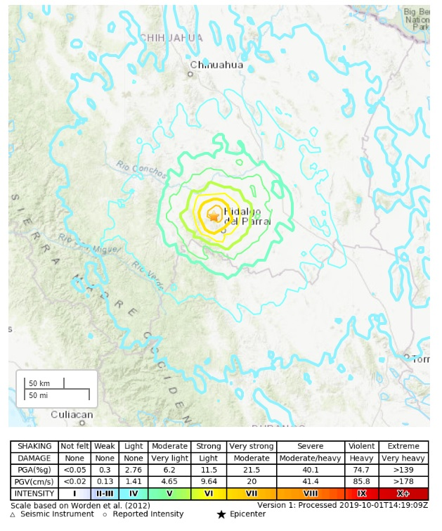 Contorno de intensidades del sismo de magnitud 6.4, del 31 de octubre de 1928 en Parral, Chihuahua, México